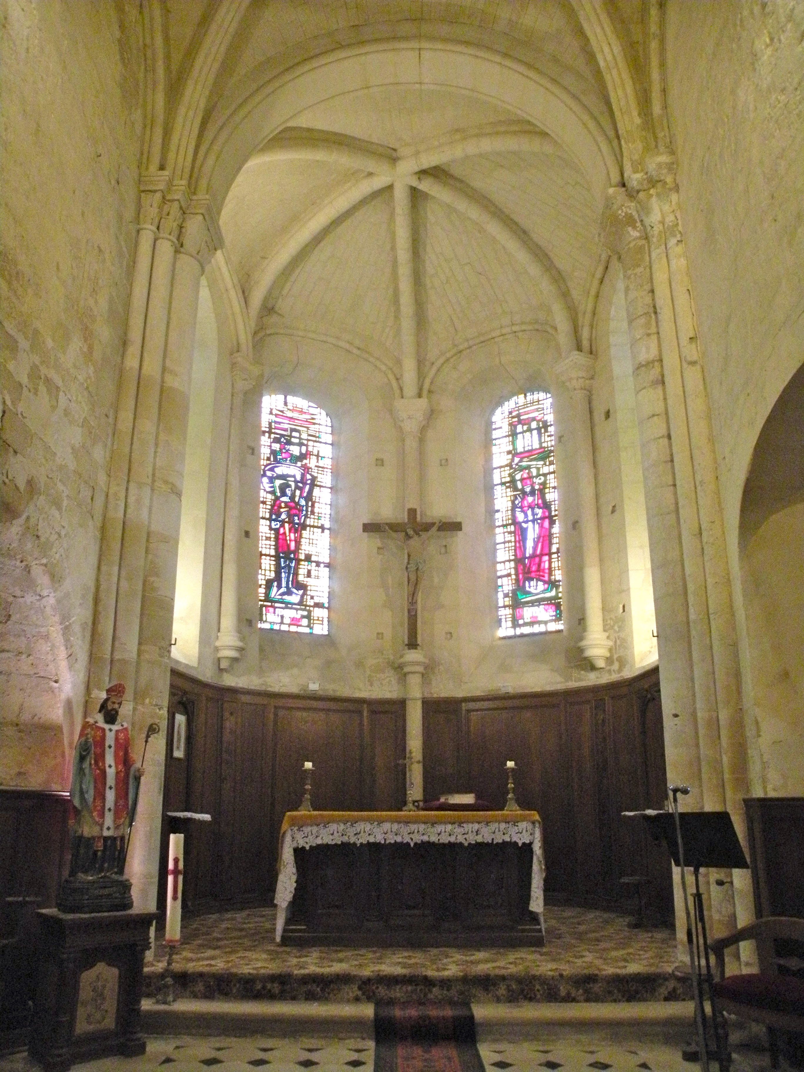 Église Saint-Denis de Jouy-le-Comte autel principal